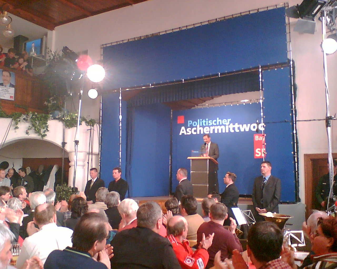 Der politische Aschermittwoch der SPD im Wolferstetter Keller in Vilshofen im Jahre 2006. Der Sprecher ist Matthias Platzeck.